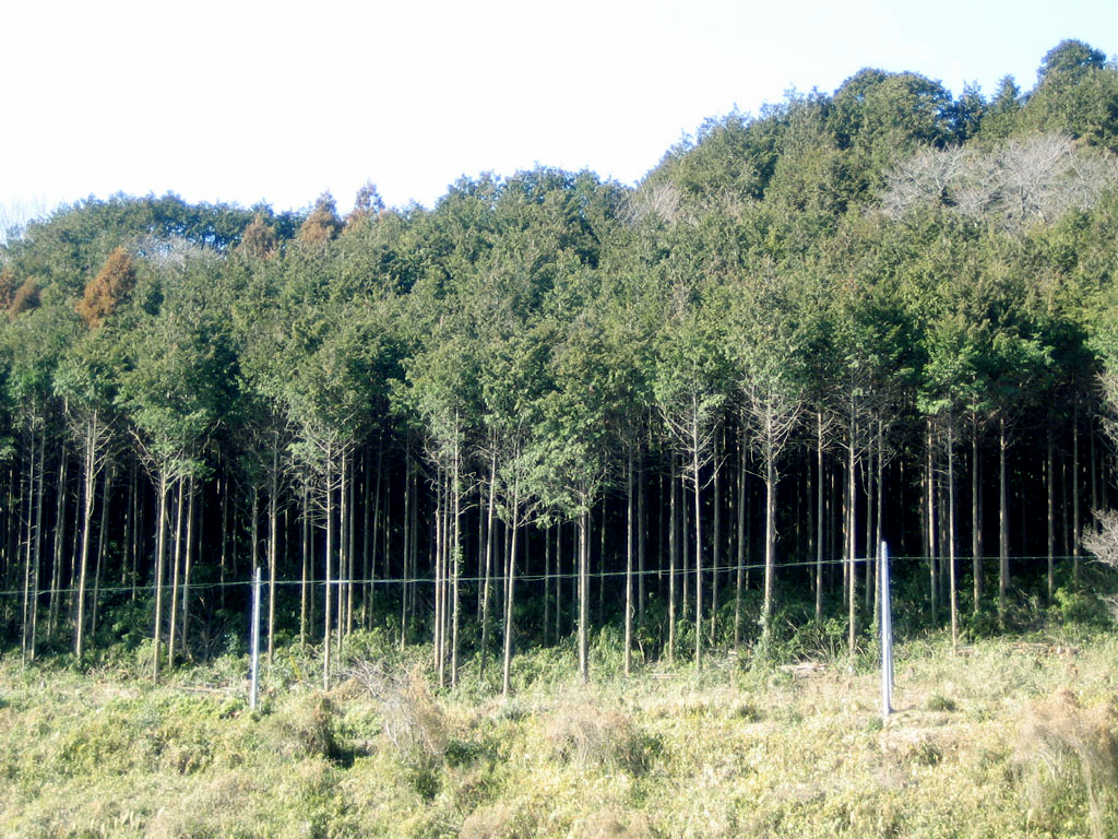 Cryptomeria japonica